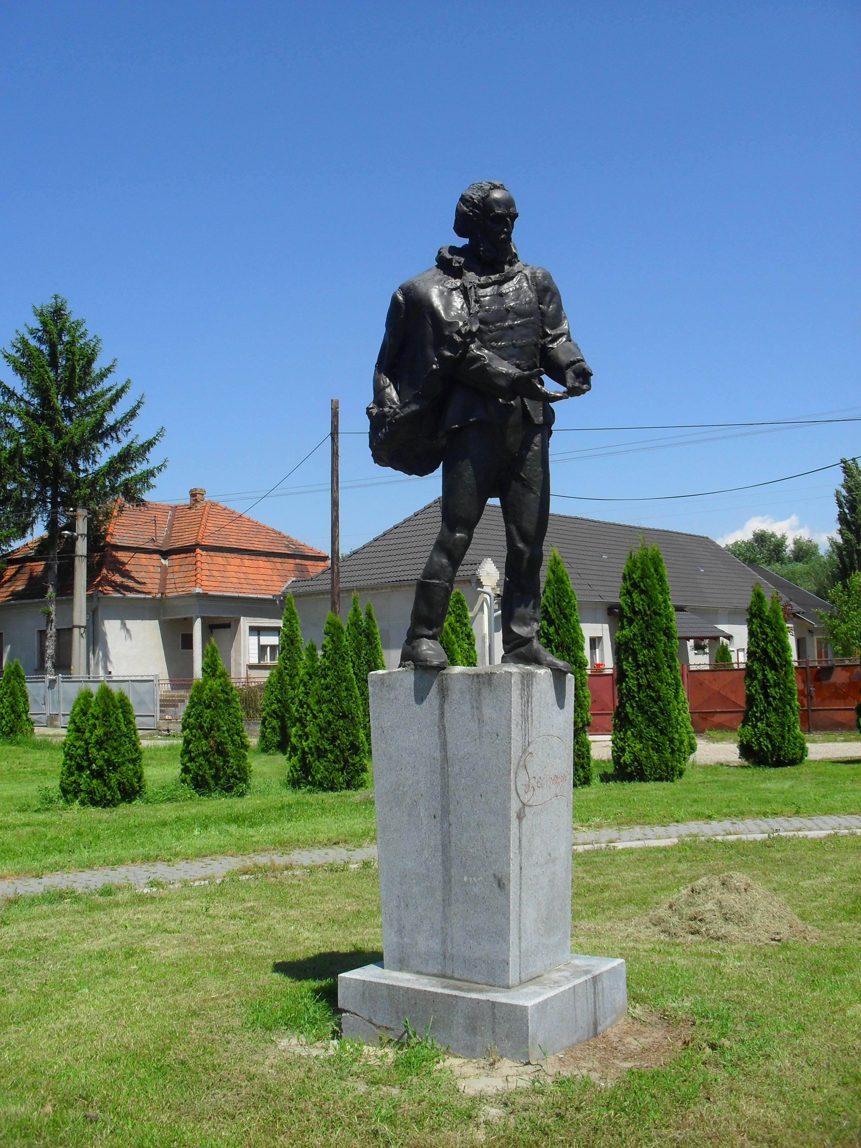 Hetény - Széchenyi István szobra